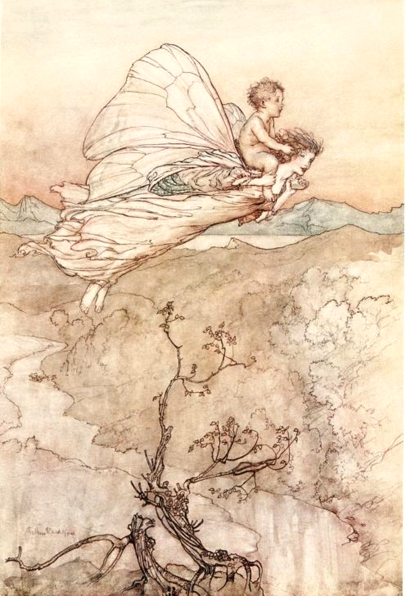 A Midsummer Night's Dream, par A. Rackham, 1908 ː Titania cède à la demande d'Obéron et envoie une de ses fées lui apporter le petit indien comme page.